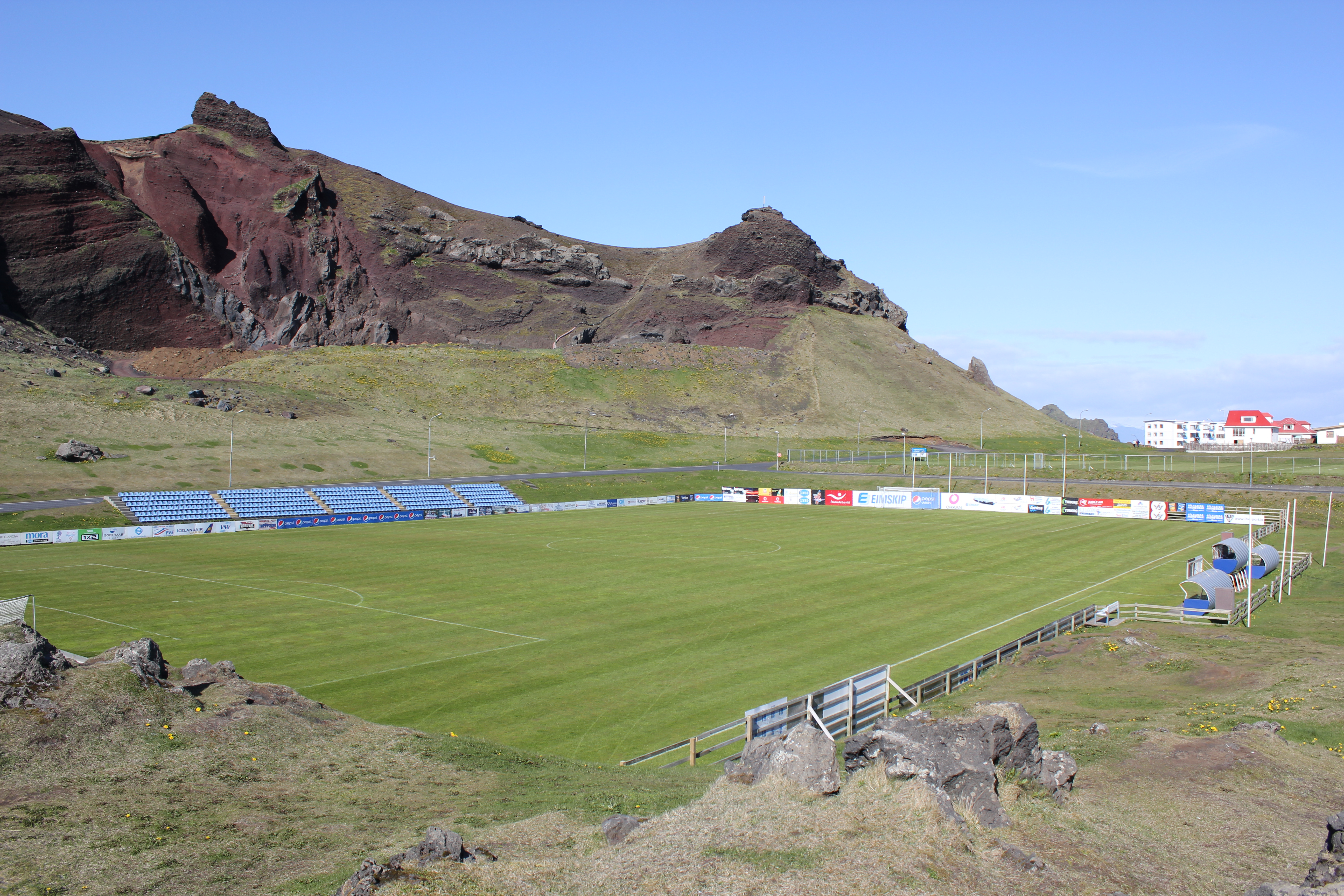 Hásteinsvöllur í vestmannaeyjum